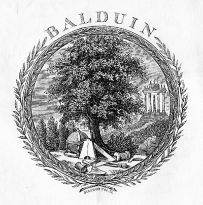 Vignette der Leipziger Freimaurerloge Balduin zur Linde Verzeichnis sämtlicher Mitglieder der gerechten und vollkommenen Freimaurer-Loge Balduin zur Linde in Leipzig. Sechs und sechszigster Jahrgang 1842. Titelseite, Melzer 1842